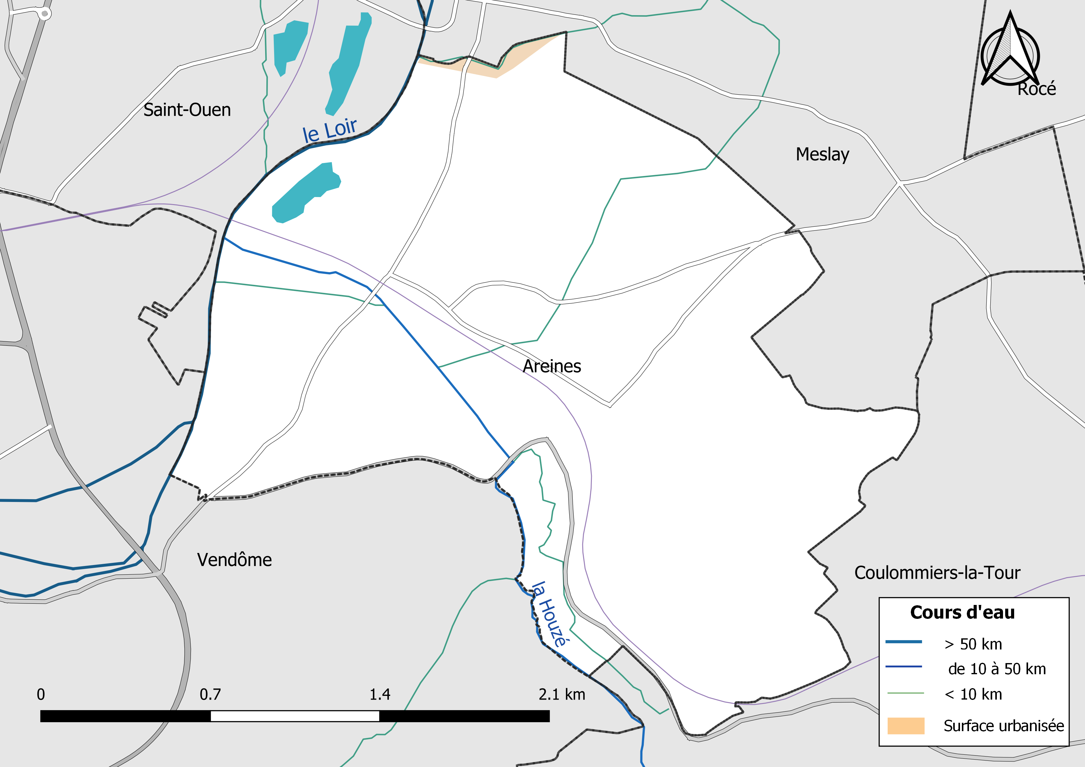 Carte du réseau hydrographique de la commune d'Areines (France).